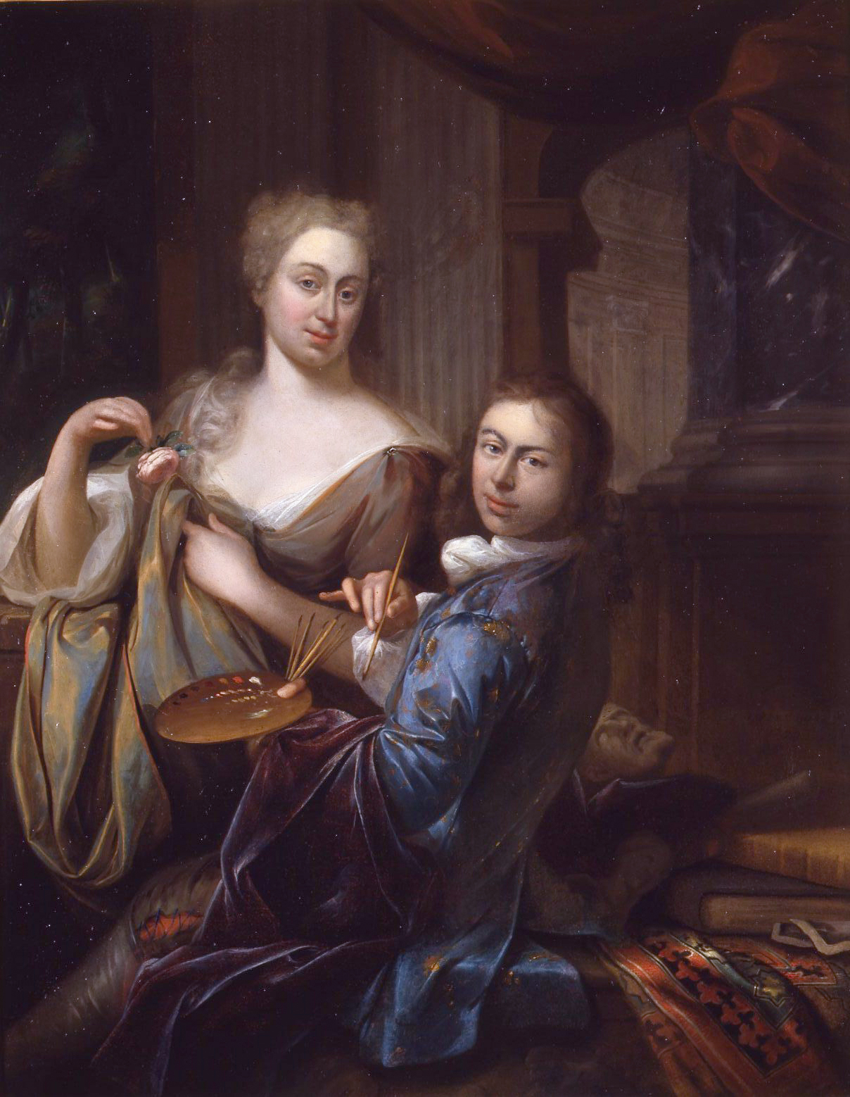 The Painter and his Wifelabel QS:Lde,"Der Maler und seine Frau"label QS:Len,"The Painter and his Wife"label QS:Lnl,"De schilder en zijn vrouw"